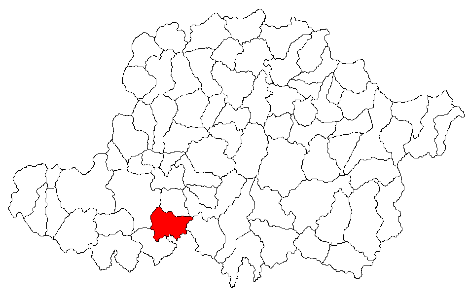 Categorie:Hărţi ale judeţului Arad